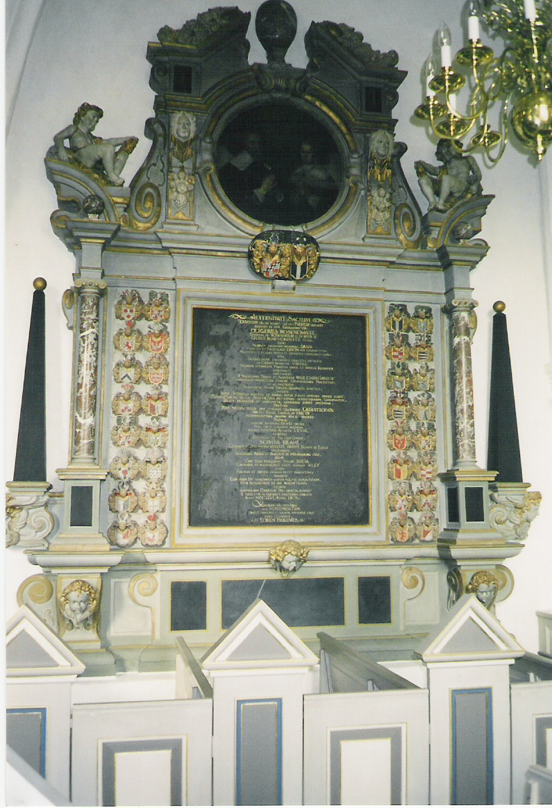 Epitafium over Holger Rosenkrantz og Sophie brahe i Hornslet Kirke Sommer 1. aug 2007, 21:55 (CEST)